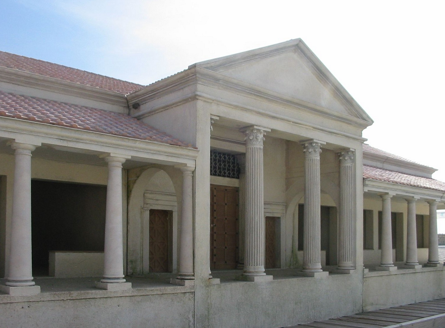 maquette des thermes romaines au Fa, à Barzan (17), France